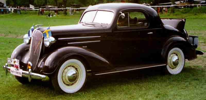 1936 Chevrolet Master De Luxe Series FD Sport Coupe